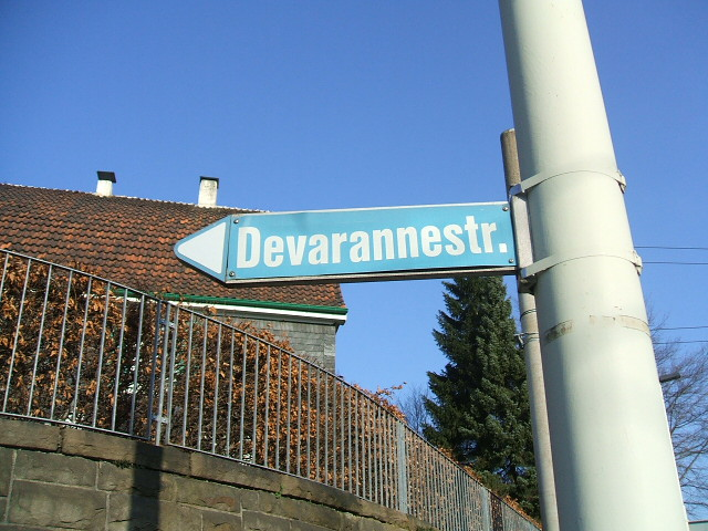 Straßenschild der Devaranne-Straße in Solingen-Wald